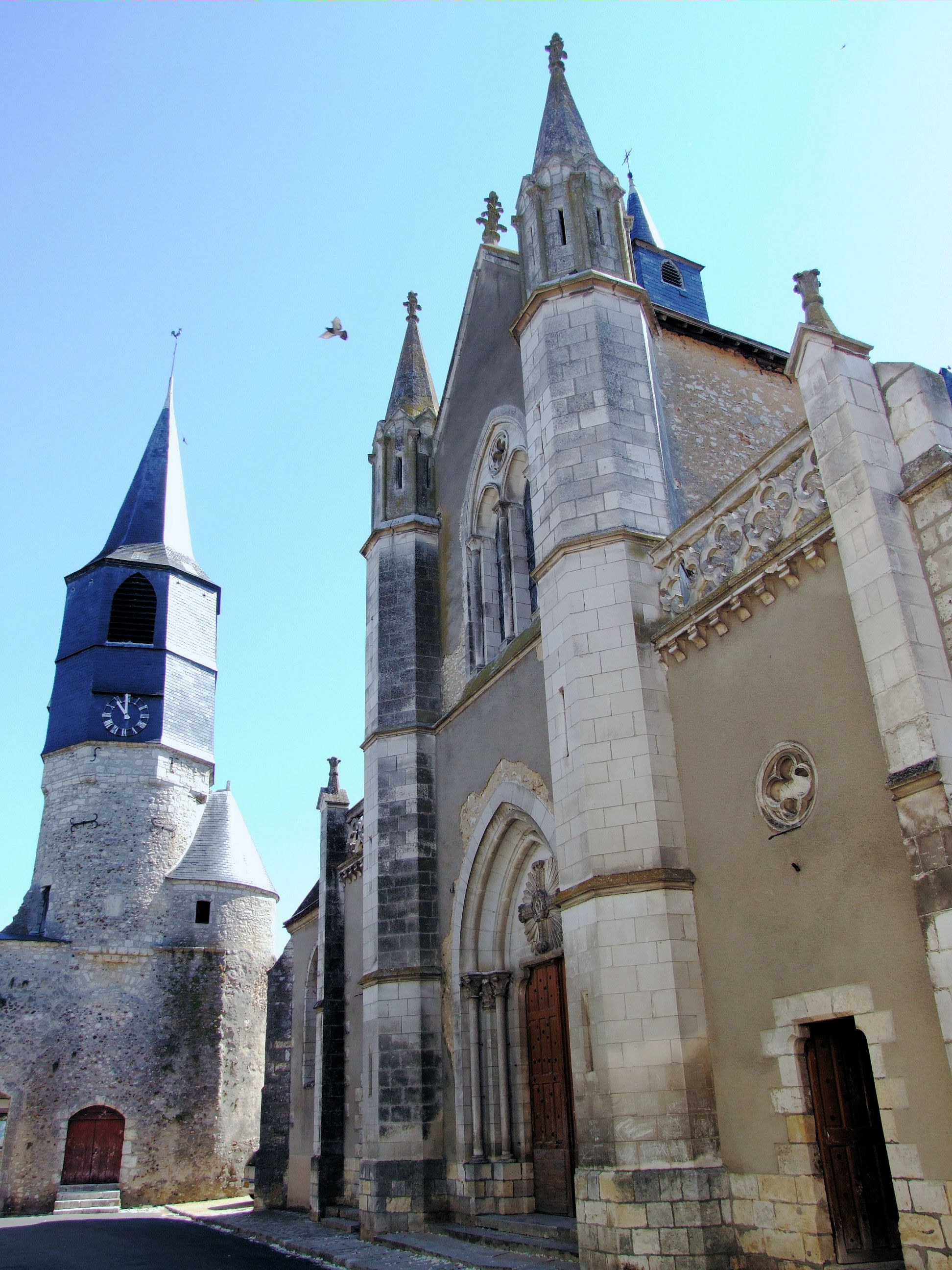 Châtillon-Coligny - Eglise Saint-Pierre-et-Saint-Paul et porte de ville